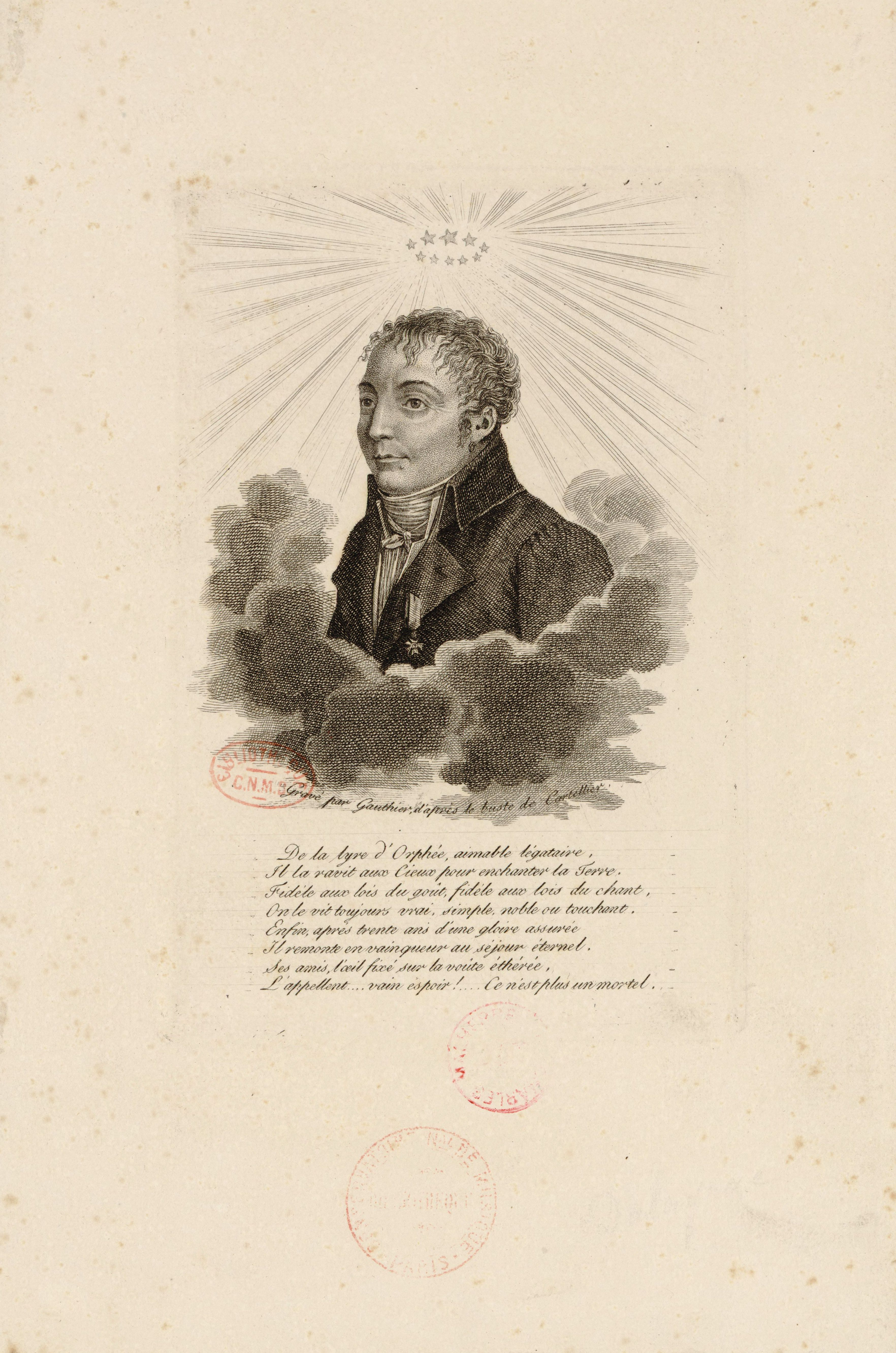 Buste de Nicolas Dalayrac tourné vers sa droite, surmonté d’une couronne d’étoiles et portant la croix de la Légion d’honneur. Sous-jacent se trouve un huitain.